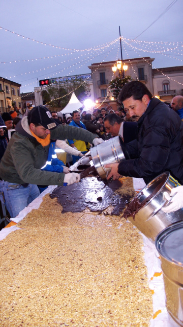 Una tavola di torrone gigante viene ricoperta di cioccolato. Festa del Torrone e del Croccantino di San Marco dei Cavoti (BN)